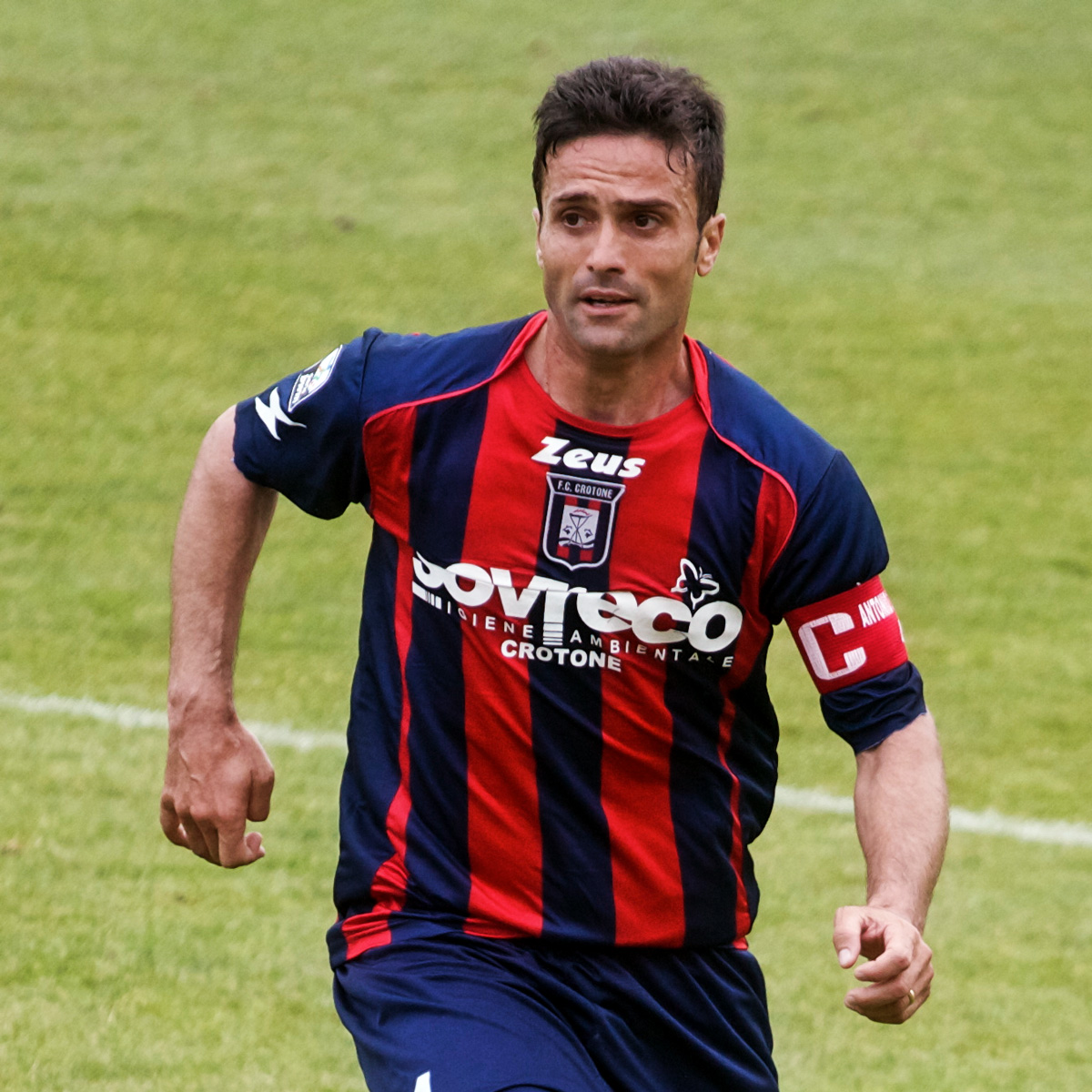 Primo piano di Antonio Galardo